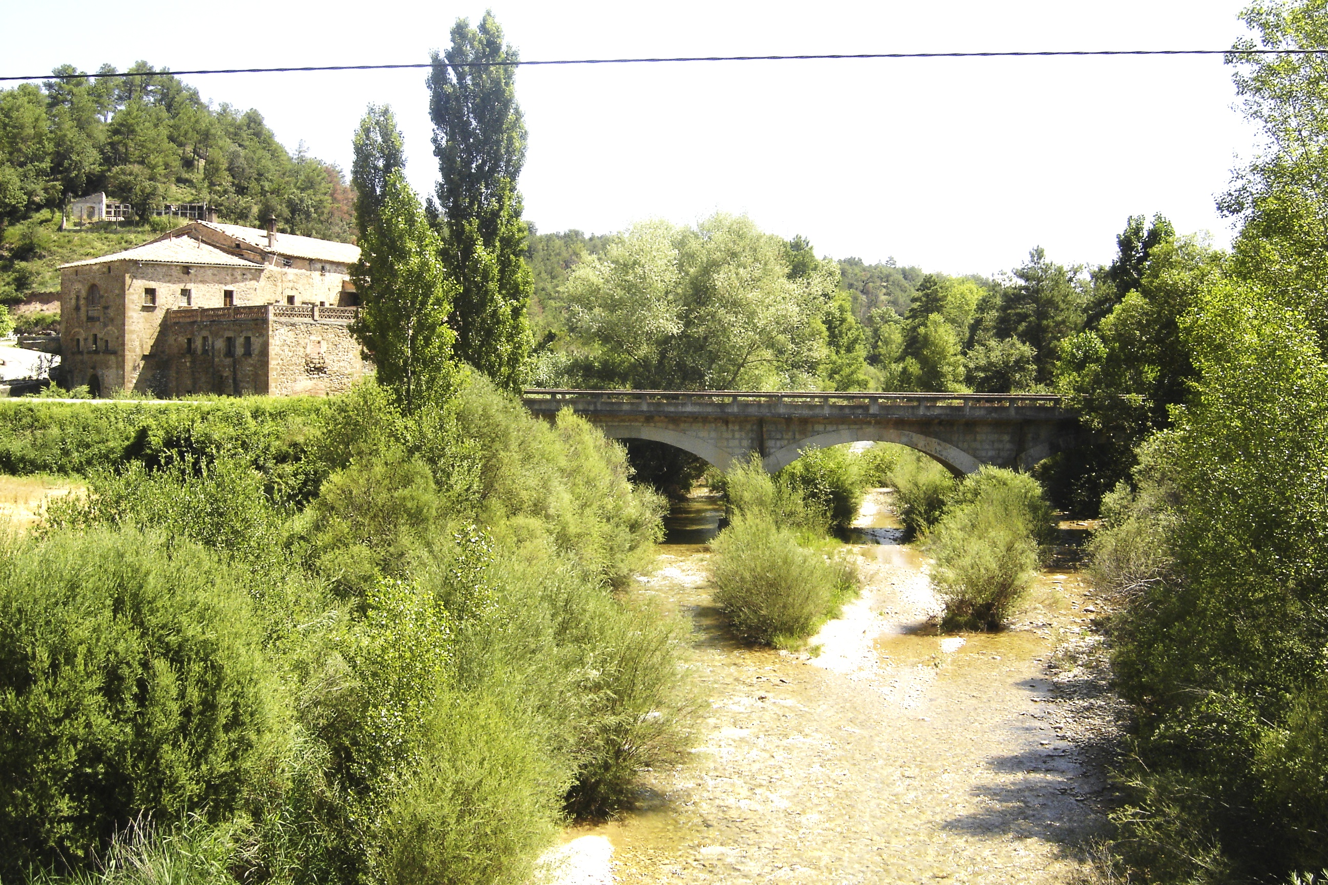 La Ribera Salada travessant el pont de la Ctra. de Solsona a Bassella a l'alçada del Molí de Querol (Castellar de la Ribera)